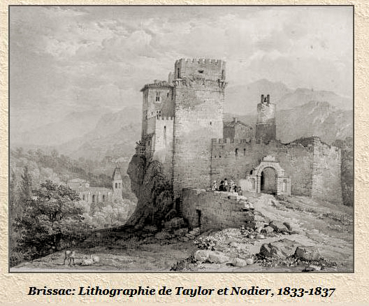 Brissac (Hérault) - château de Brissac (XIe siècle)